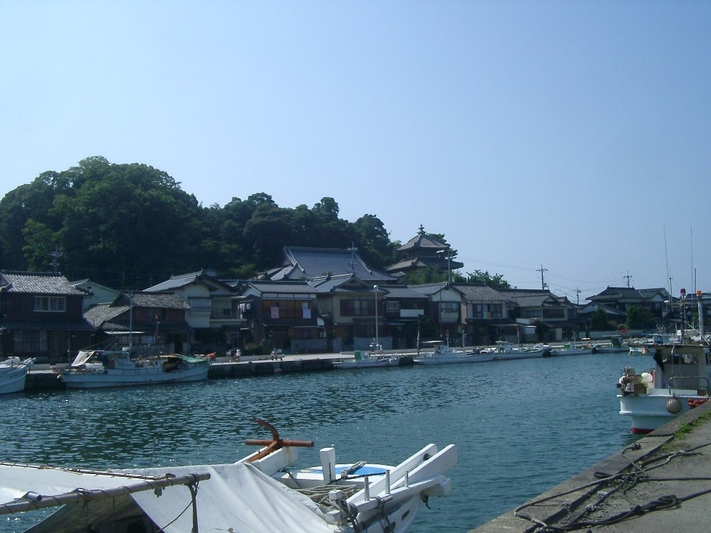 Tamae Kannon